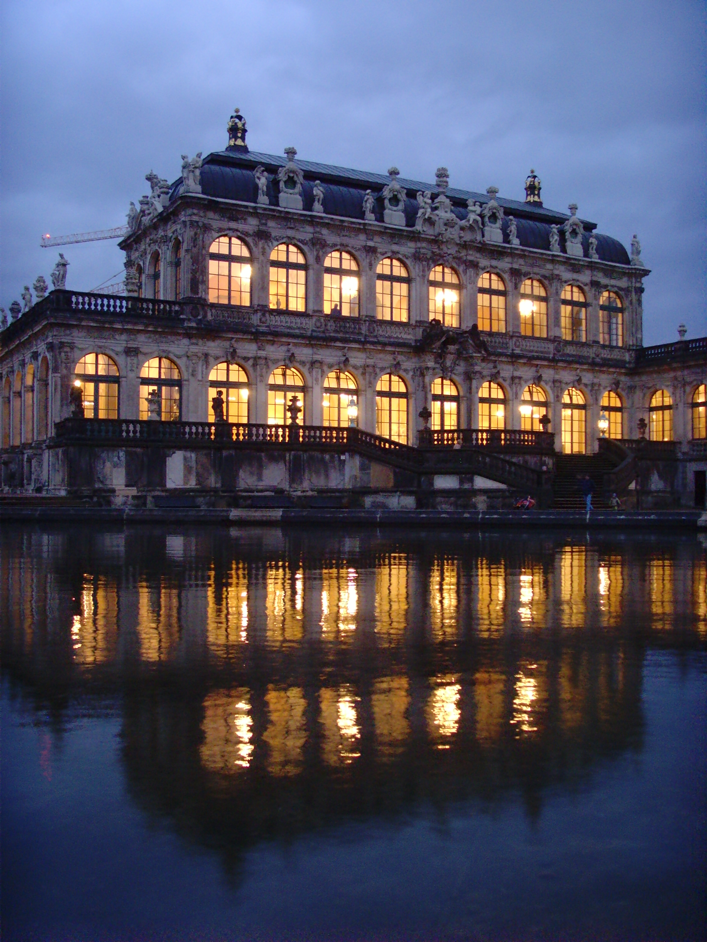 Zwinger, Dresden